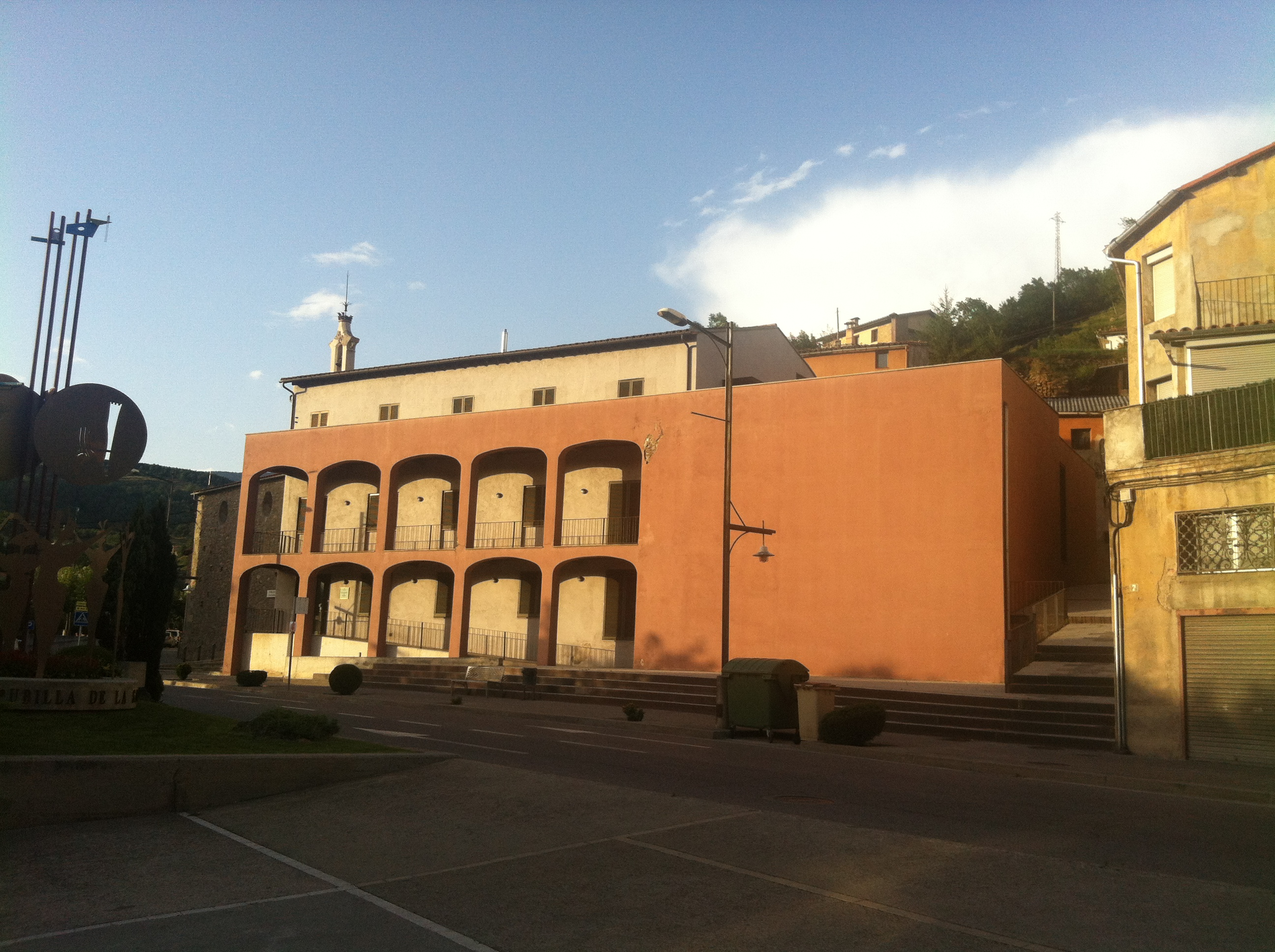 Arxiu Comarcal del Ripollès